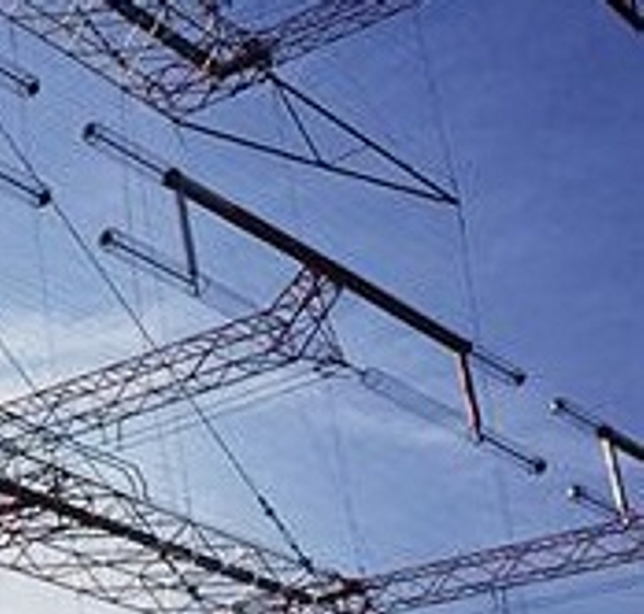 Detail einer Alliss-Antenne von Thales von 1993: Dipol teilweise als Drahtreuse